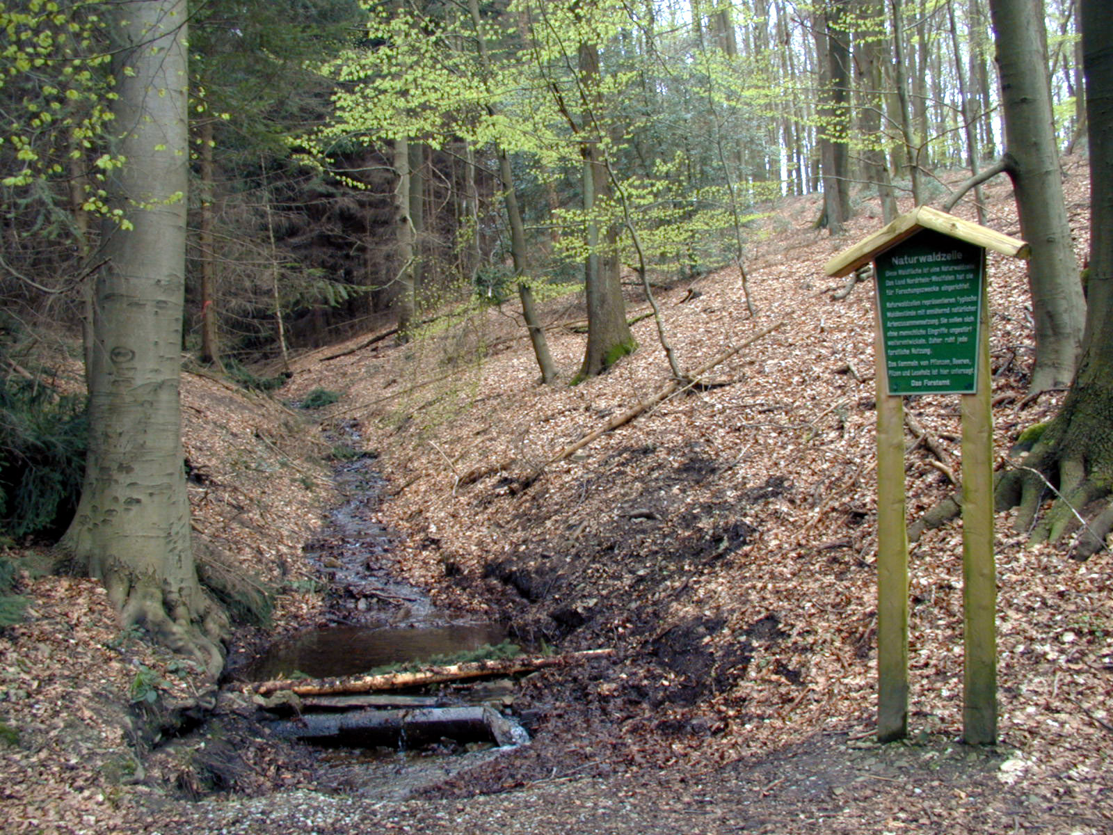 Naturwaldzelle „Meersiepenkopf“ im Naturschutzgebiet „Burgholz“, Staatsforst Burgholz (Wuppertal)